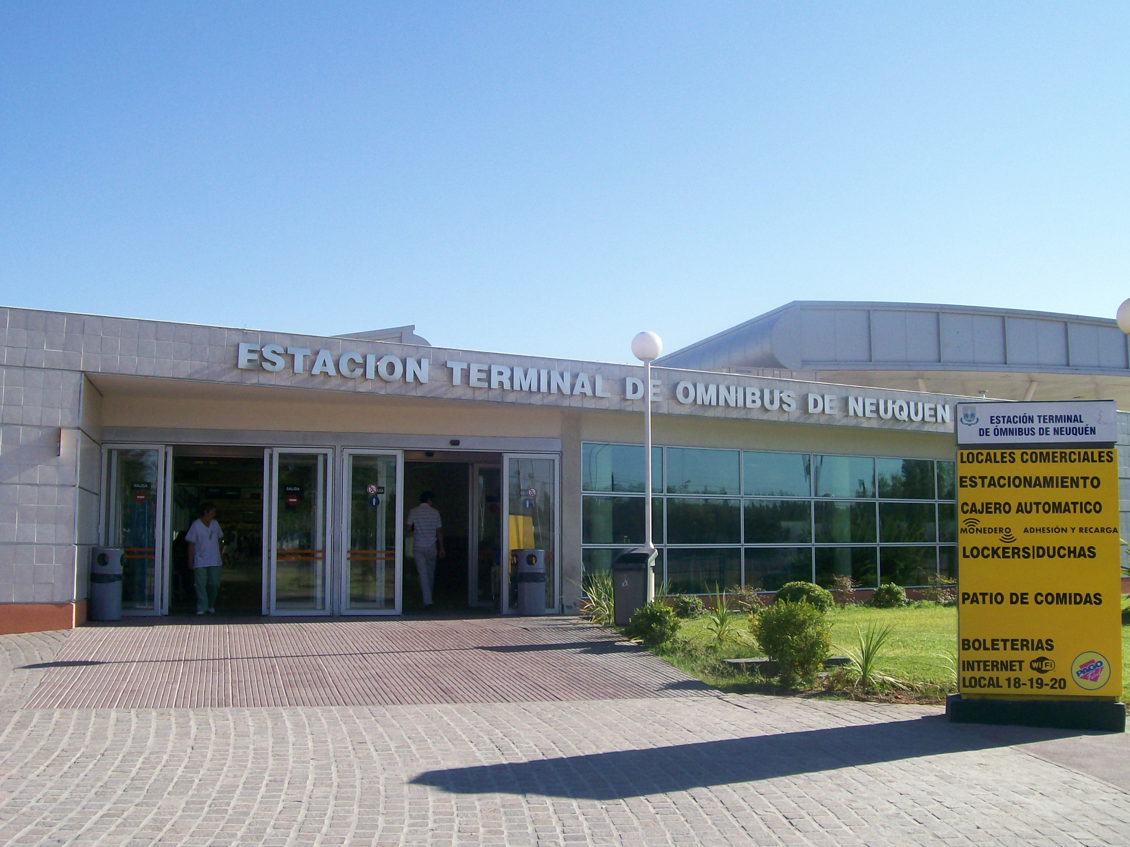 Terminal de Omnibus de Neuquén.